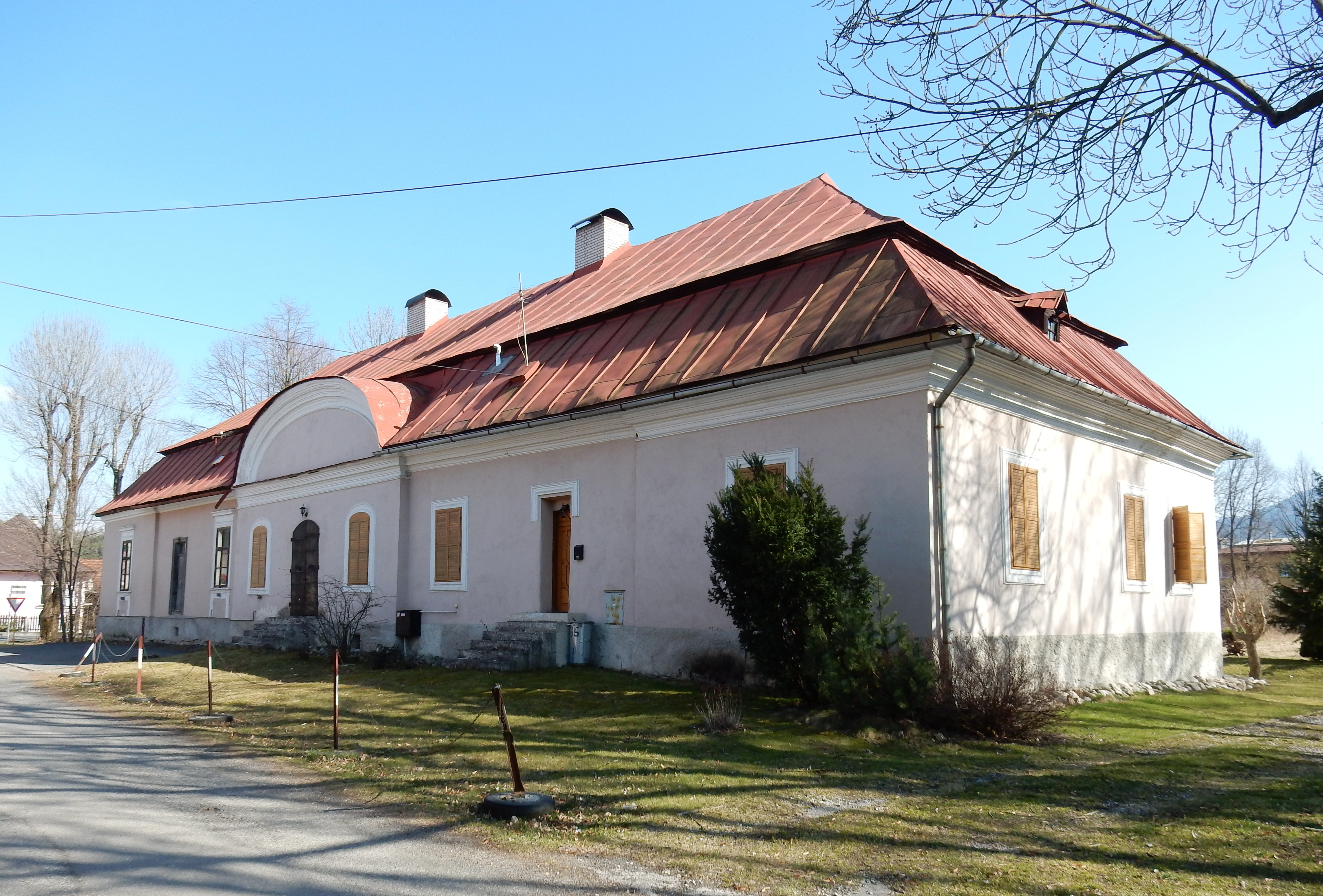 Podtureň, okr. Liptovský Mikuláš - kaštieľ zvaný "Pálovské", stojaci oproti obecnému úradu. Pôvodne renesančná stavba na pôdoryse obdĺžnika s manzardvou strechou z prvej štvrtiny 17. storočia. V polovici 18. storočia prešiel barokovou úpravou. Stavbu nechal postaviť zeman Pavol Podturňanský, podľa ktorého nesie meno.